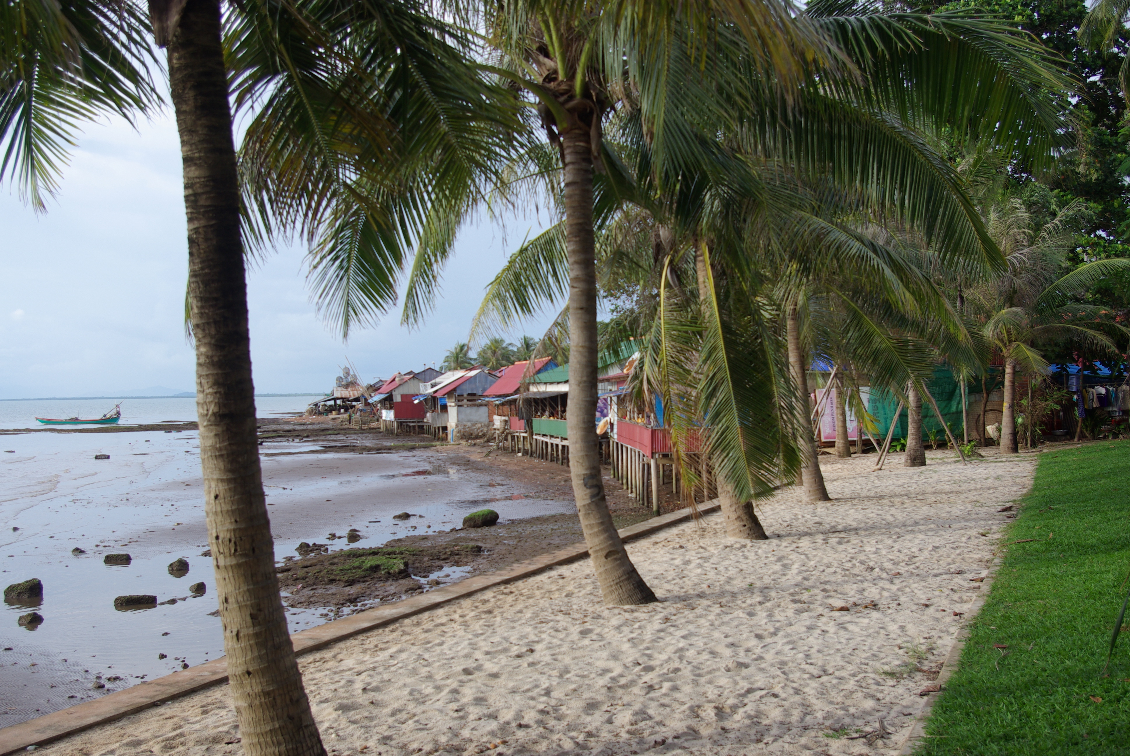 Le marché des pecheurs vue de la promenade